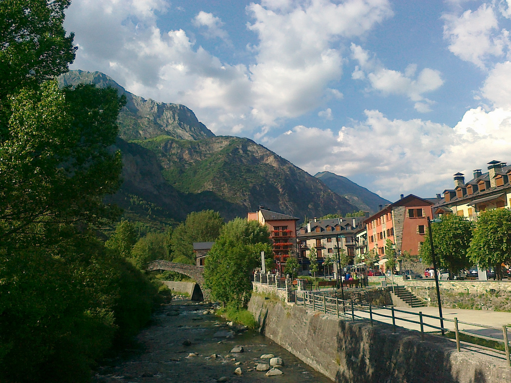 Rio Esera, Benasque